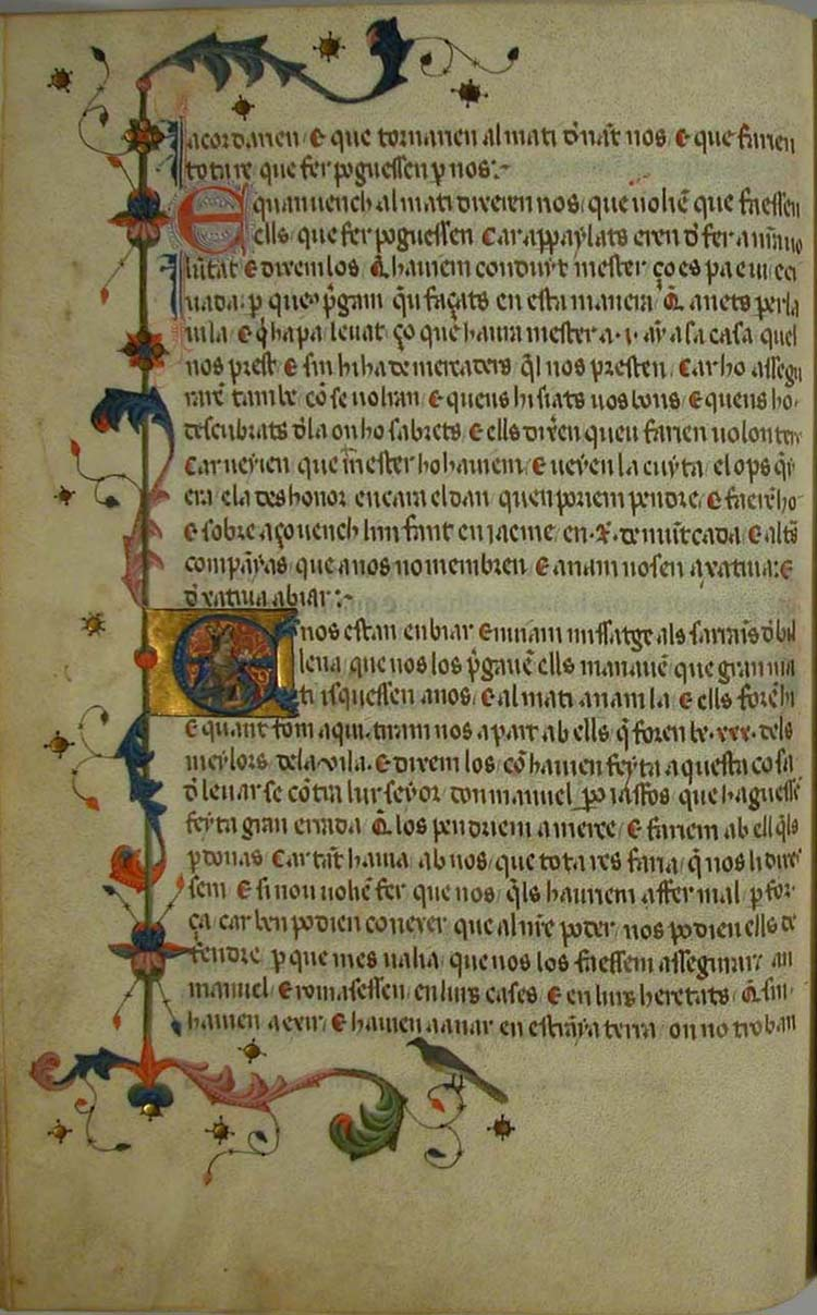 Libre dels Feyts